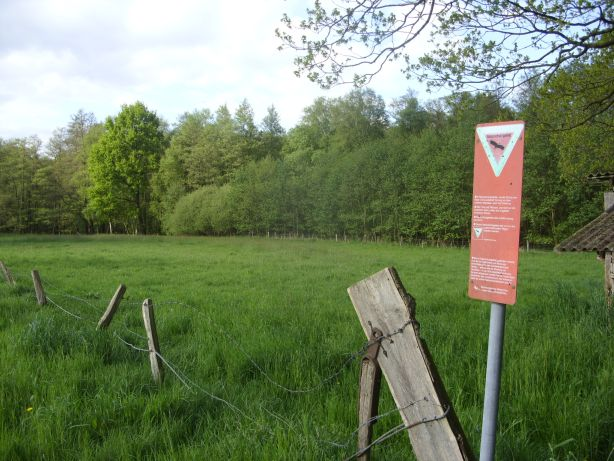 Naturschutzgebiet „Bäken der Endeler und Holzhauser Heide“